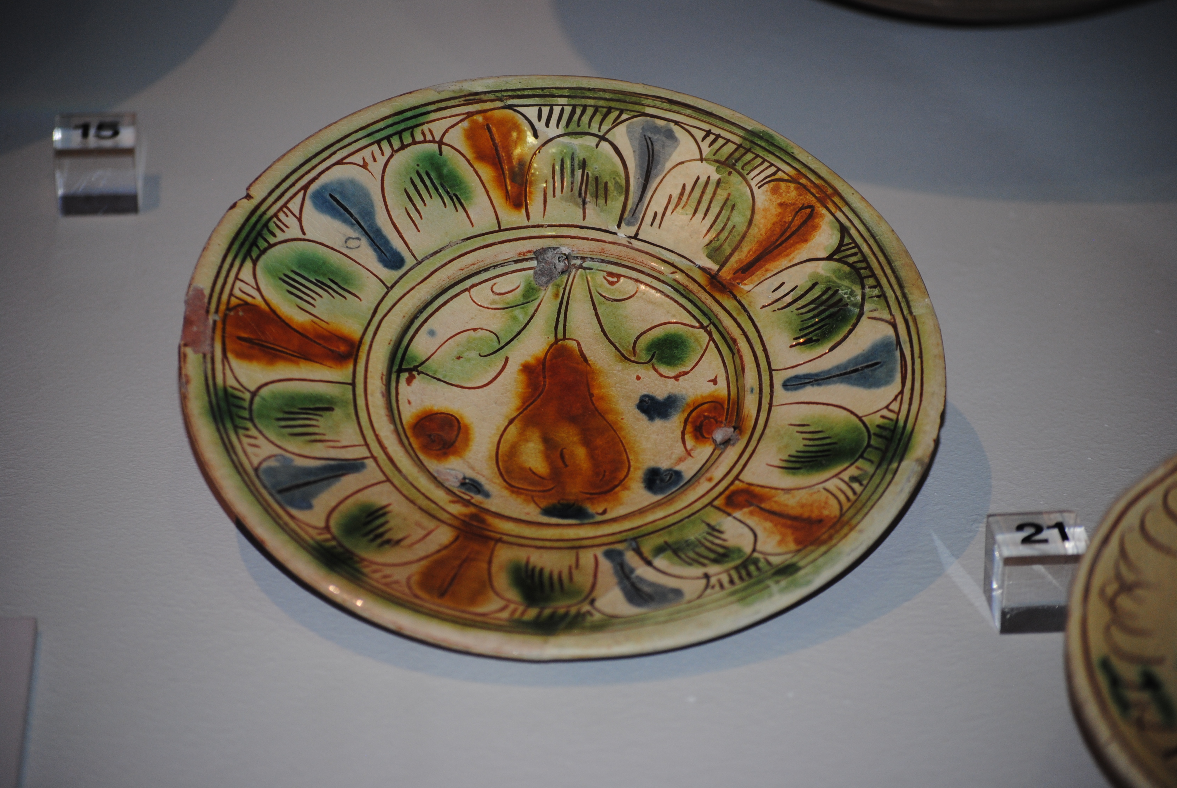 Scodella ingobbiata e graffita a punta della fine del XVI - inizi del XVII secolo (appartenente alla collezione Tongiorgi, Pisa) - Museo nazionale di San Matteo.